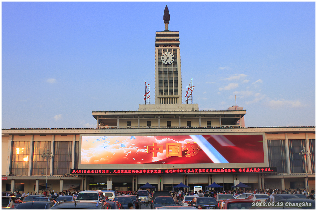 长沙火车站